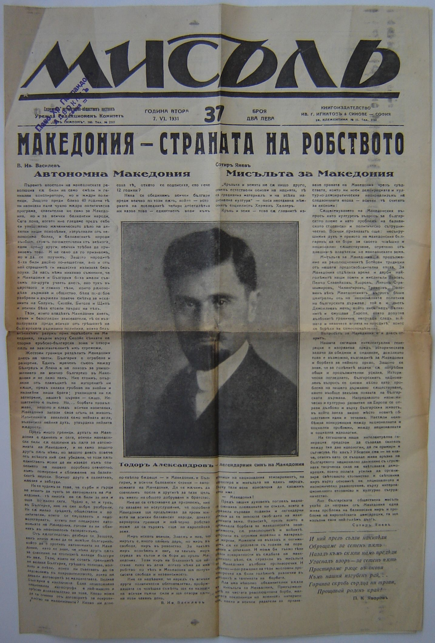 Първа страница на вестник "Мисъл".